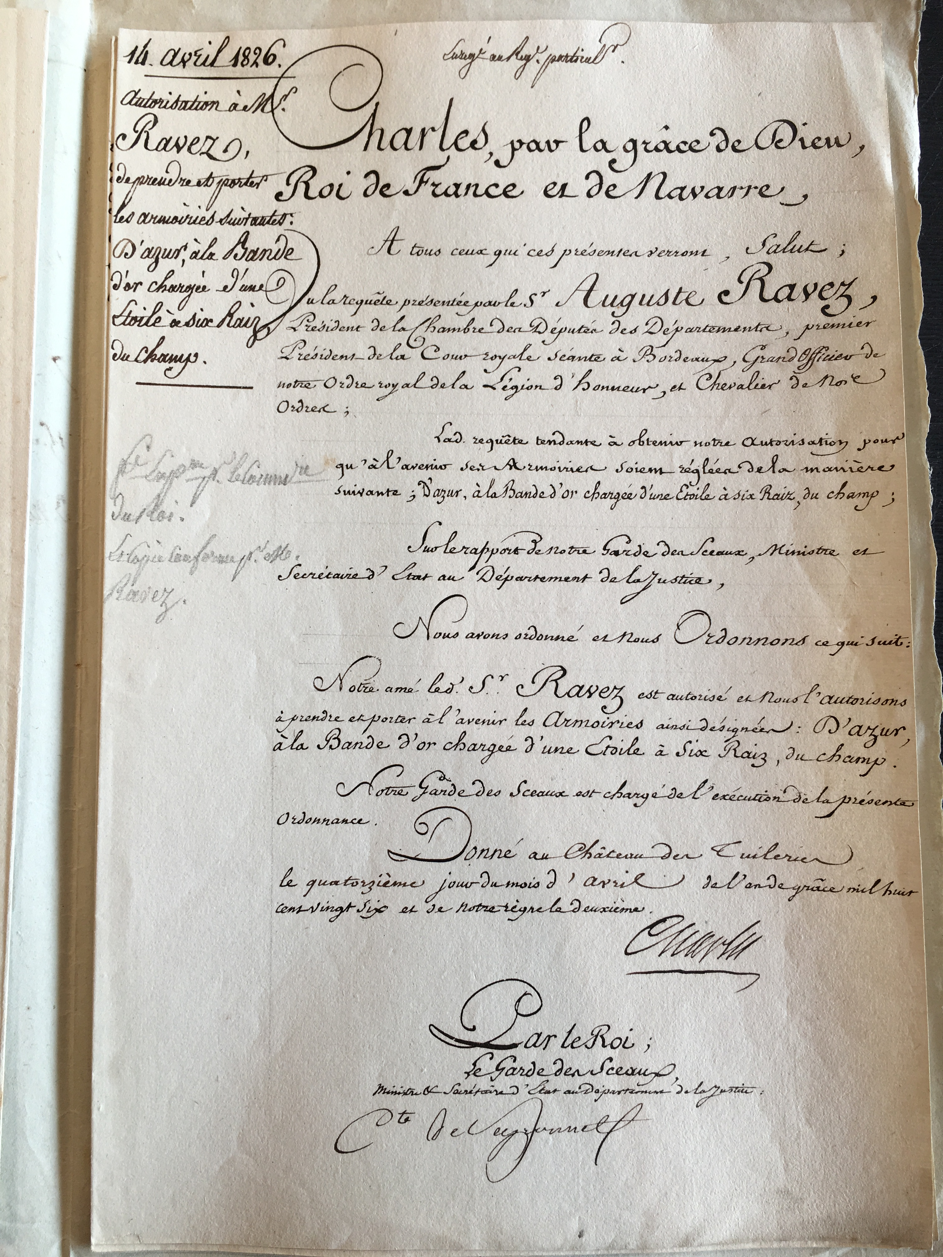 Ordonnance Royale du14 avril 1826 concernant le règlement d'armoiries d'Auguste RAVEZ